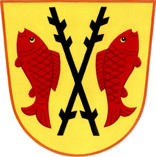 znak, Dyjákovice, okres Znojmo